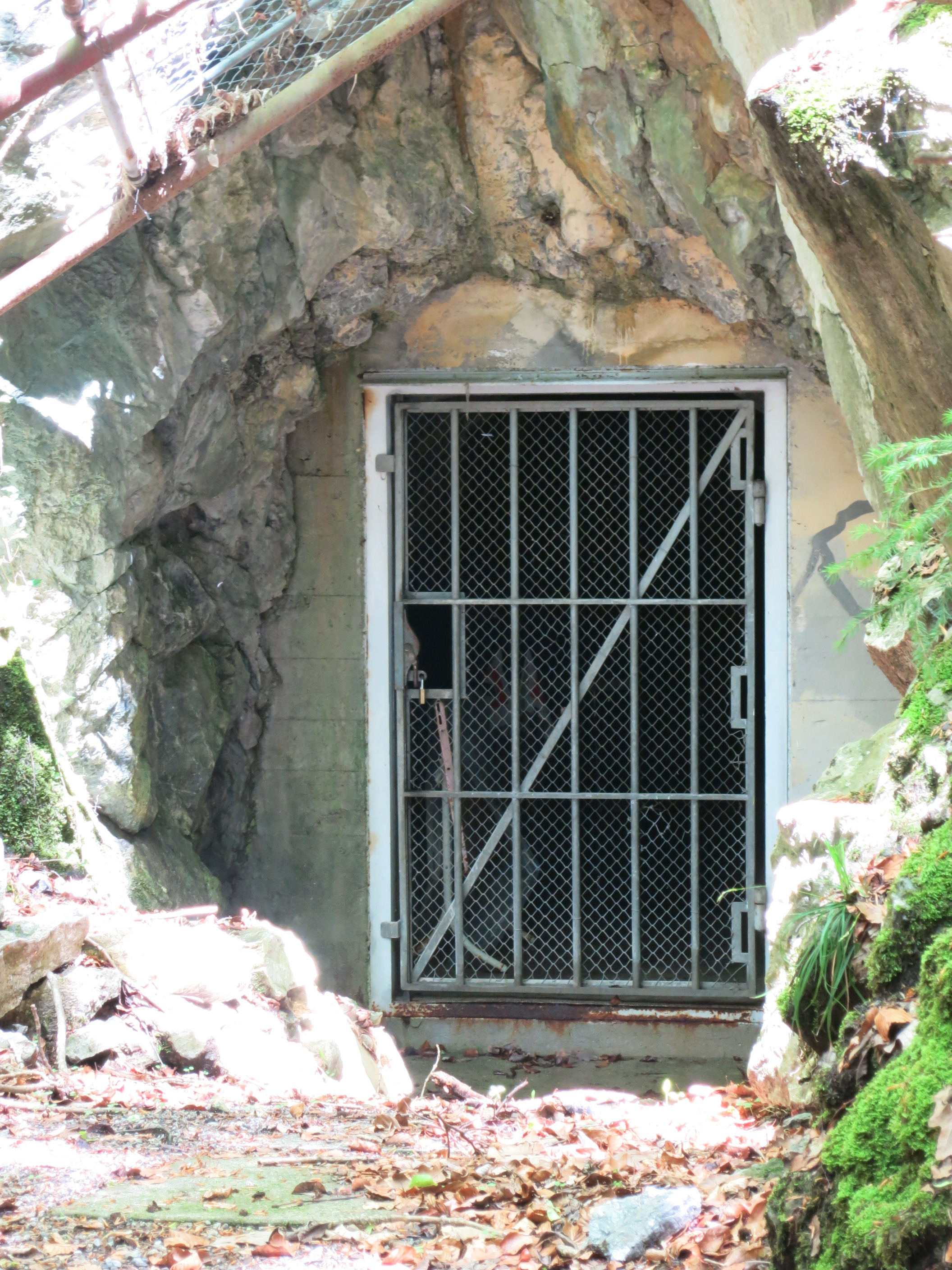 KP Heinrich, Spiez BE, Schweiz